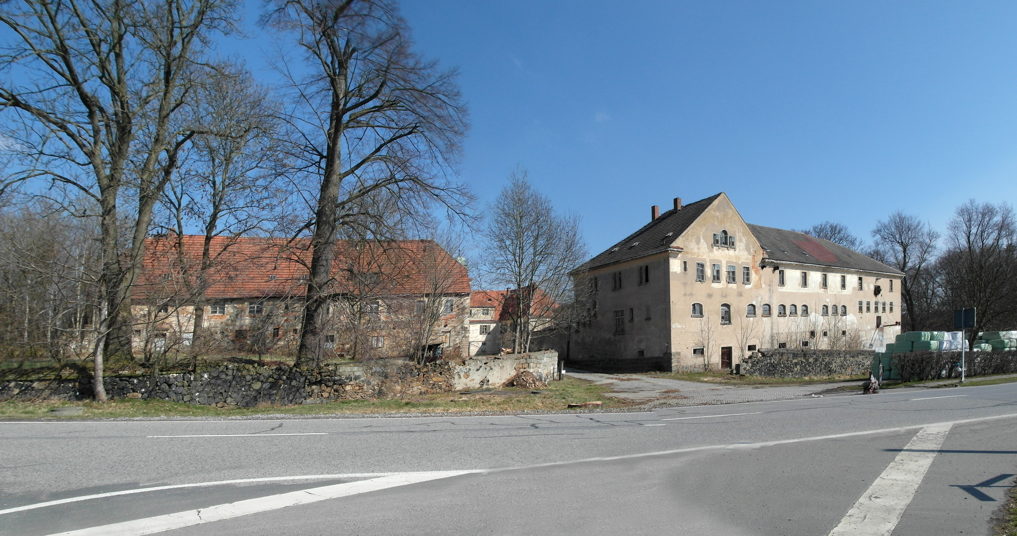 16.03.2016 01833 Rennersdorf (Rennersdorf-Neudörfel, zu Stolpen), Alte Hauptstraße 4 (GMP: 51.058508,14.064024): Rittergut und Herrenhaus Rennersdorf. August III., Sohn von August dem Starken, ließ 1742 den Dreiseitenhof im Barockstil errichten, der 1764 urkundlich als Kammergut bezeichnet wurde. In der DDR-Zeit befand sich im Herrenhaus das Lehrlingswohnheim der Landwirtschaftlichen roduktionsgenossenschaft (LPG). Zu Beginn der 1990er Jahre privatisiert. Sicht von Westen. [SAM3629-3630.JPG]20160316240MDR.JPG(c)Blobelt